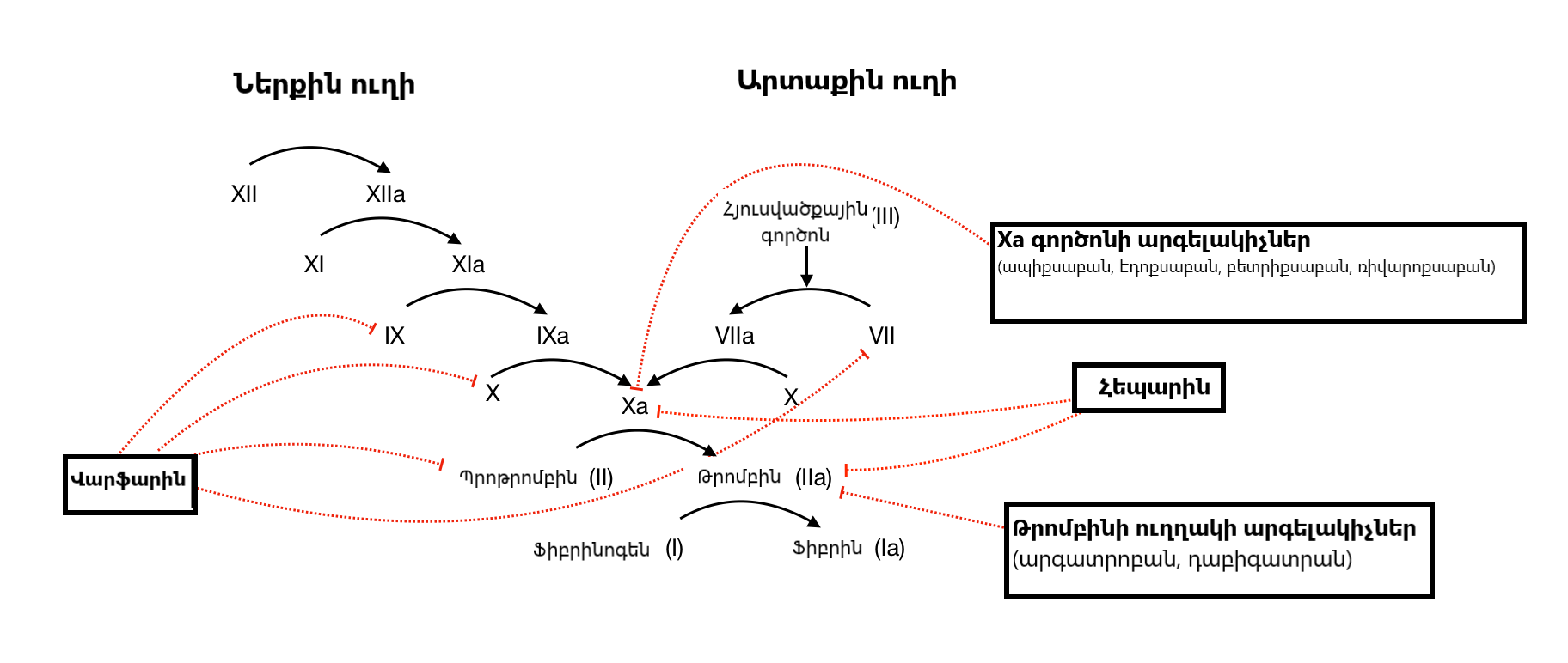 Հիմնական հակամակարդիչներն են վարֆարինը, հեպարինը, թրոմբինի ուղղակի արգելակիչները և Xa գործոնի ուղղակի արգելակիչները։ Սխեմայում ցուցադրված է մակարդման կասկադը և հակամակարդիչների ազդեցության թիրախները։